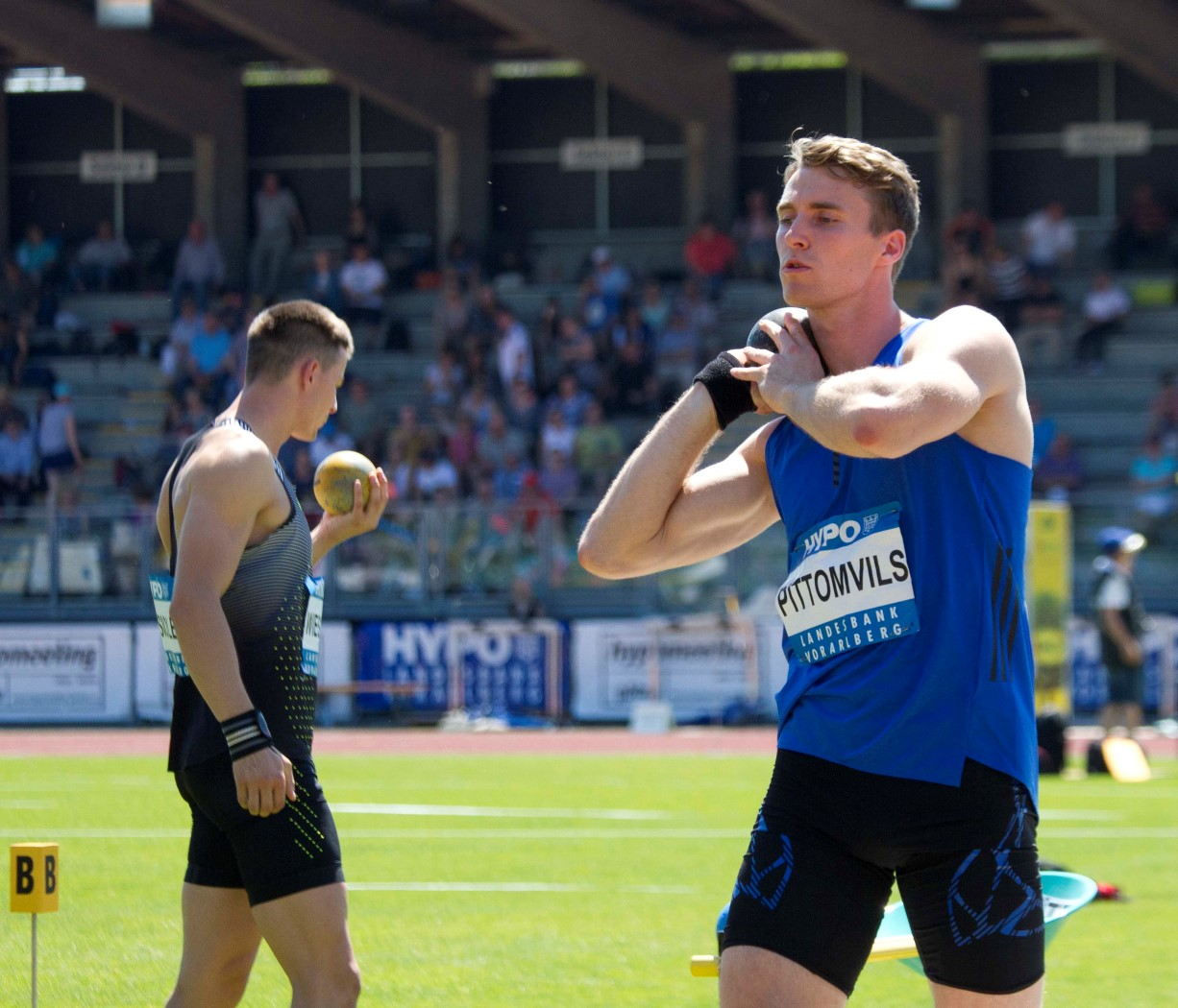 122 pittomvils kogel